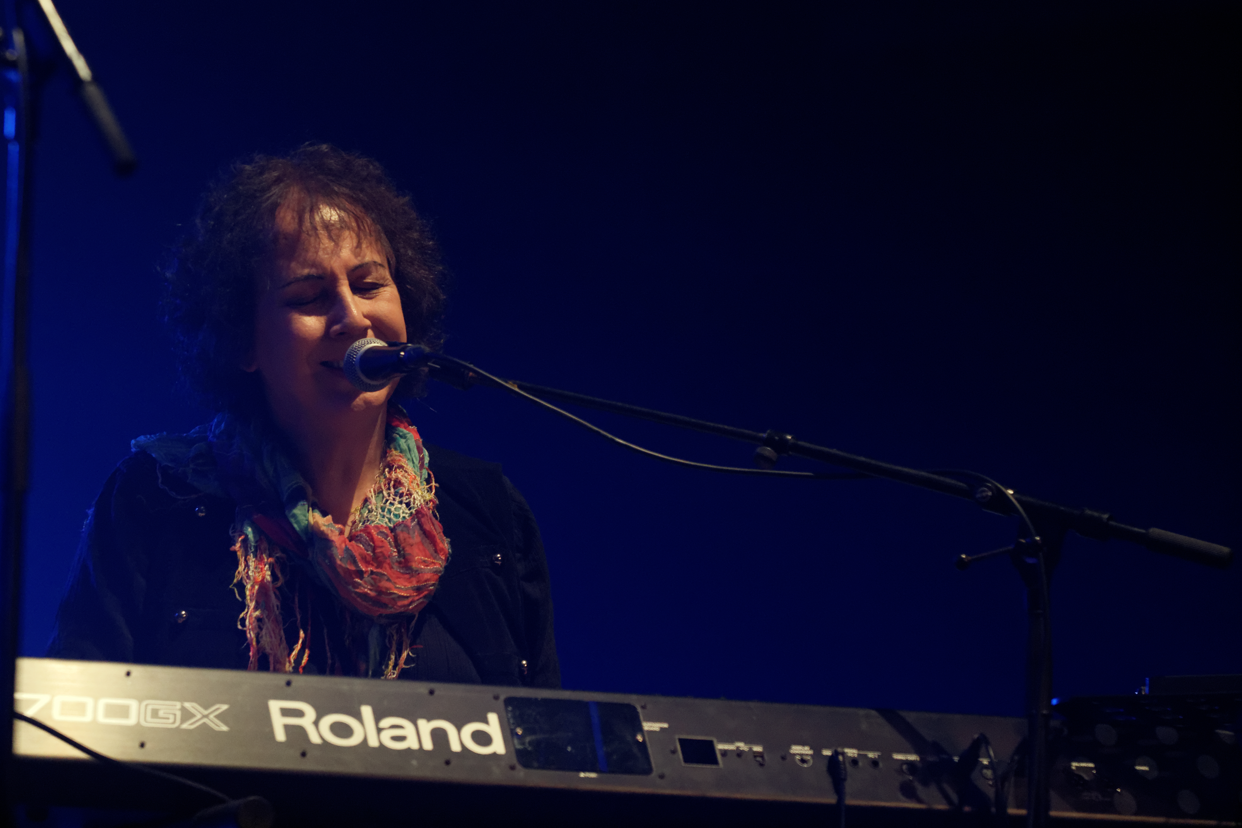 Jennifer Maidman accompagnant Murray Head en concert à l'espace Gradlon lors du festival de Cornouaille 2013.